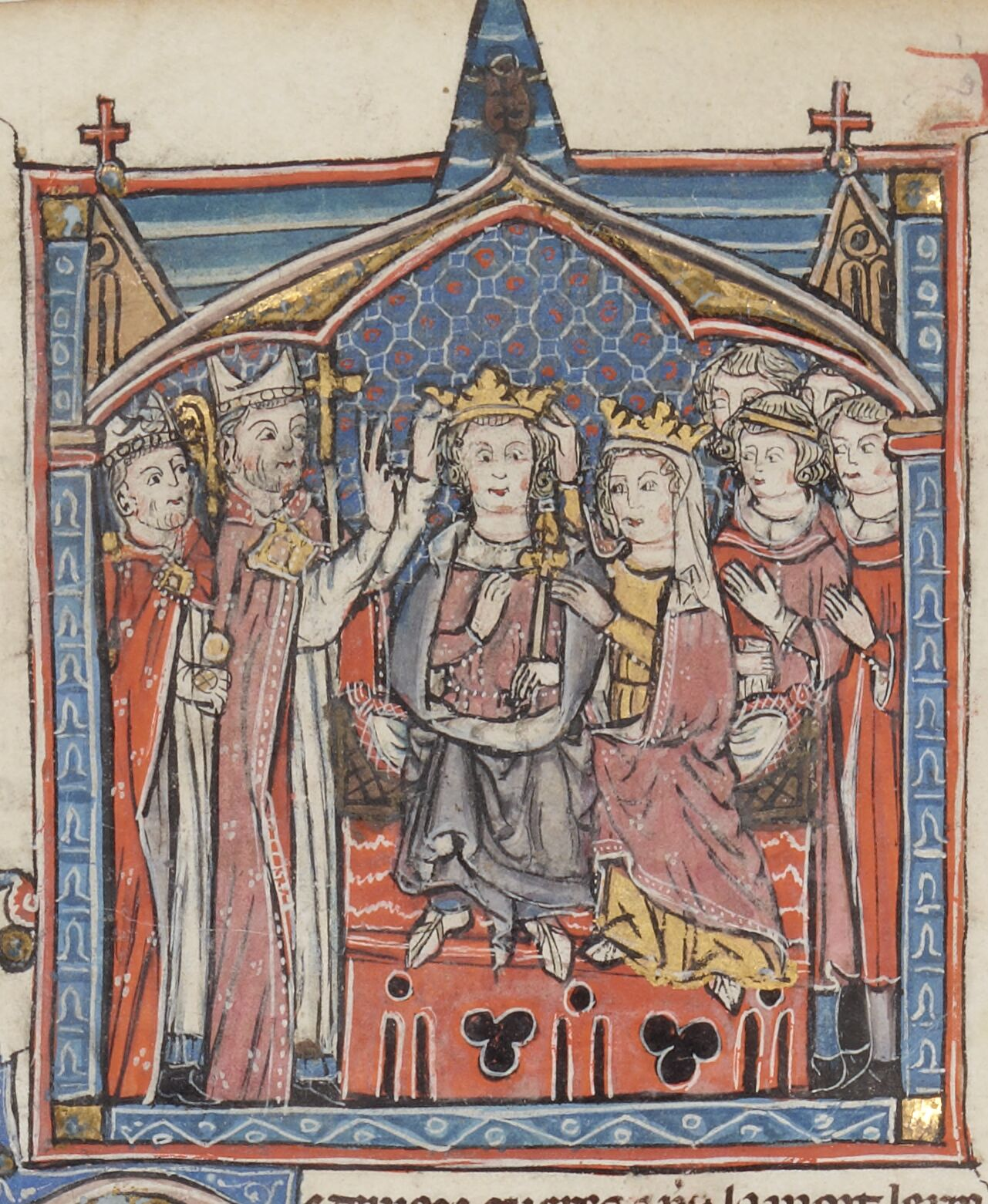 Couronnement de Baudouin III